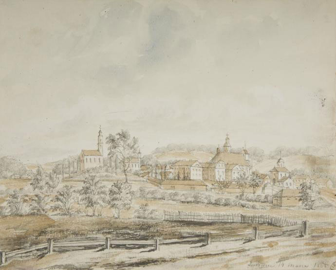 Беларуская (тарашкевіца): Жыровічы (Žyrovičy)